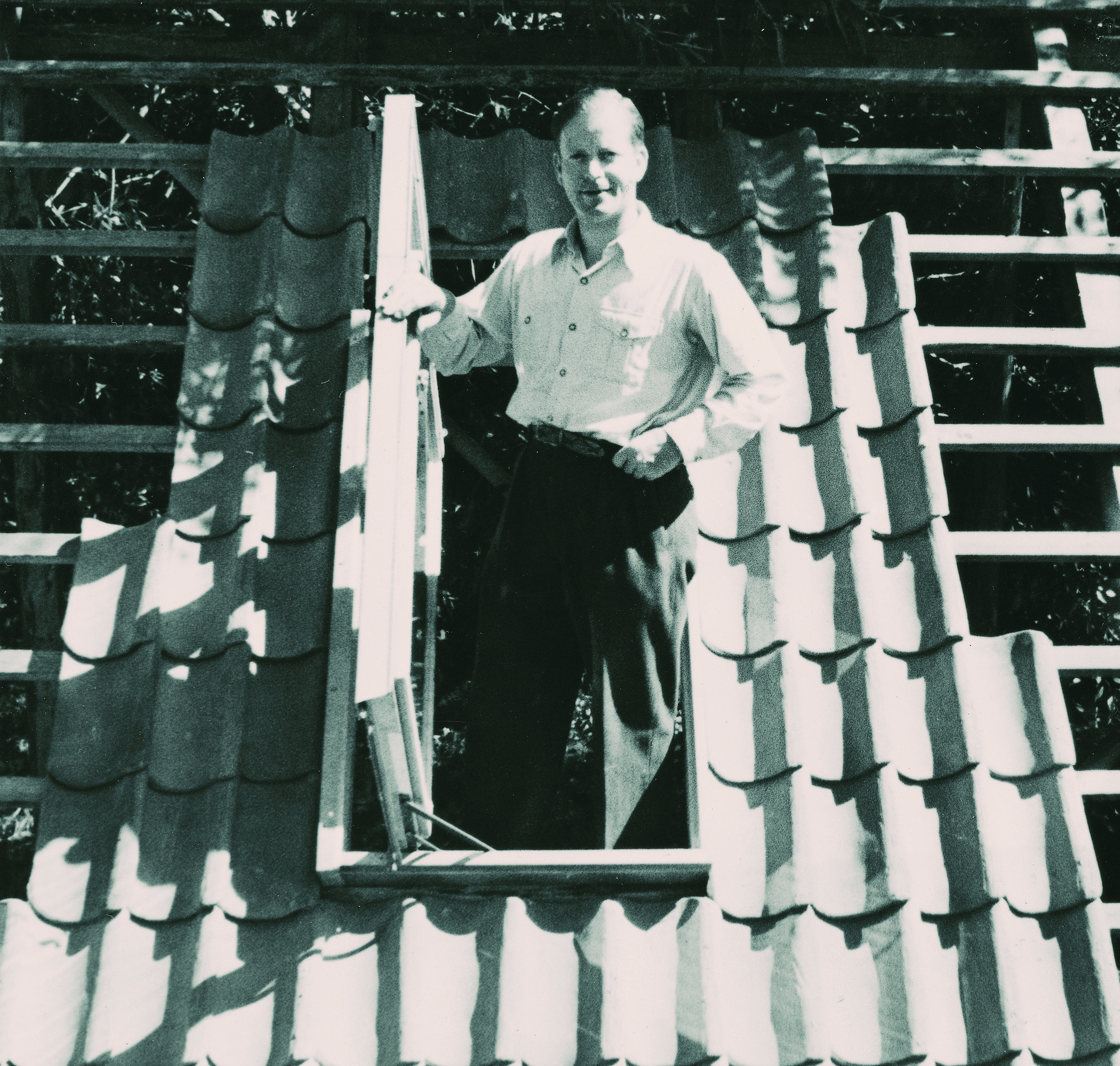 Villum Kann Rasmussen demonstreert VELUX dakraam